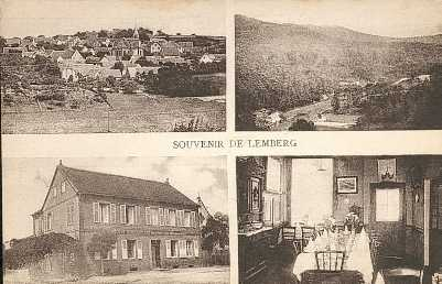 catégorie:Image de Lemberg